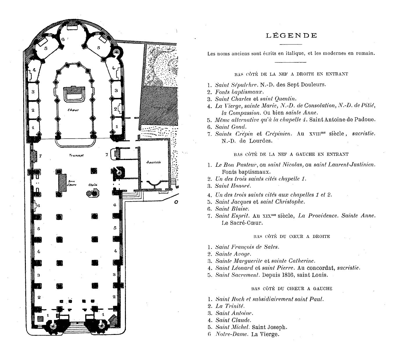 Plan au sol de l'église par Paul Guynemer, avec légende.